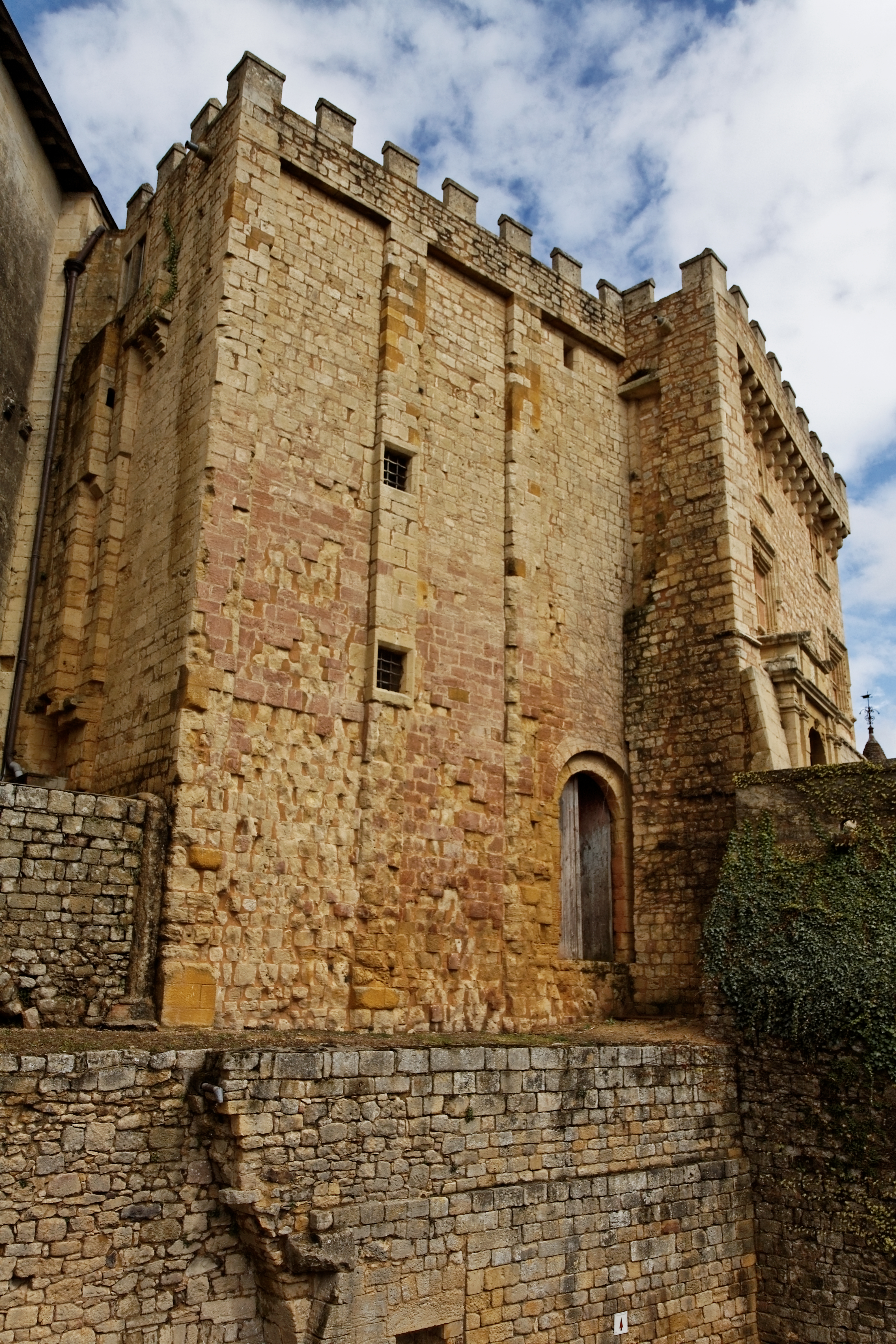 Vue du château de Biron.